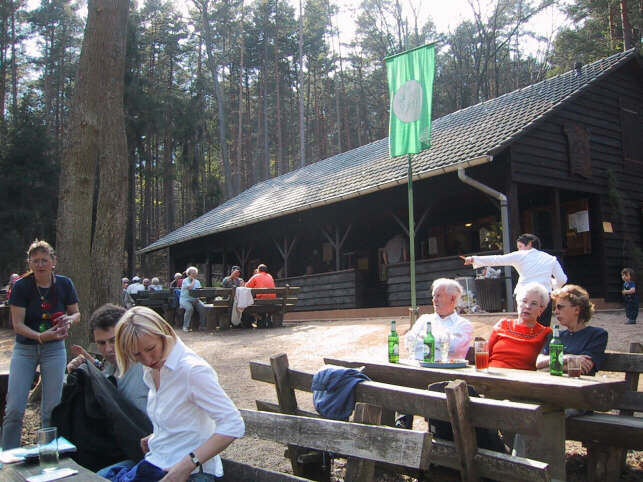 Ungeheuersee Autor: Hans Abel (Wanderhans) Datum: Sommer 2004 Beschreibung:„Biergarten“ vor der Wanderhütte am Ungeheuersee